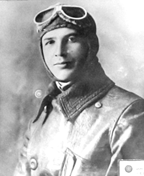 João Alexandre Busse, oficial e piloto da Polícia Militar do Paraná.